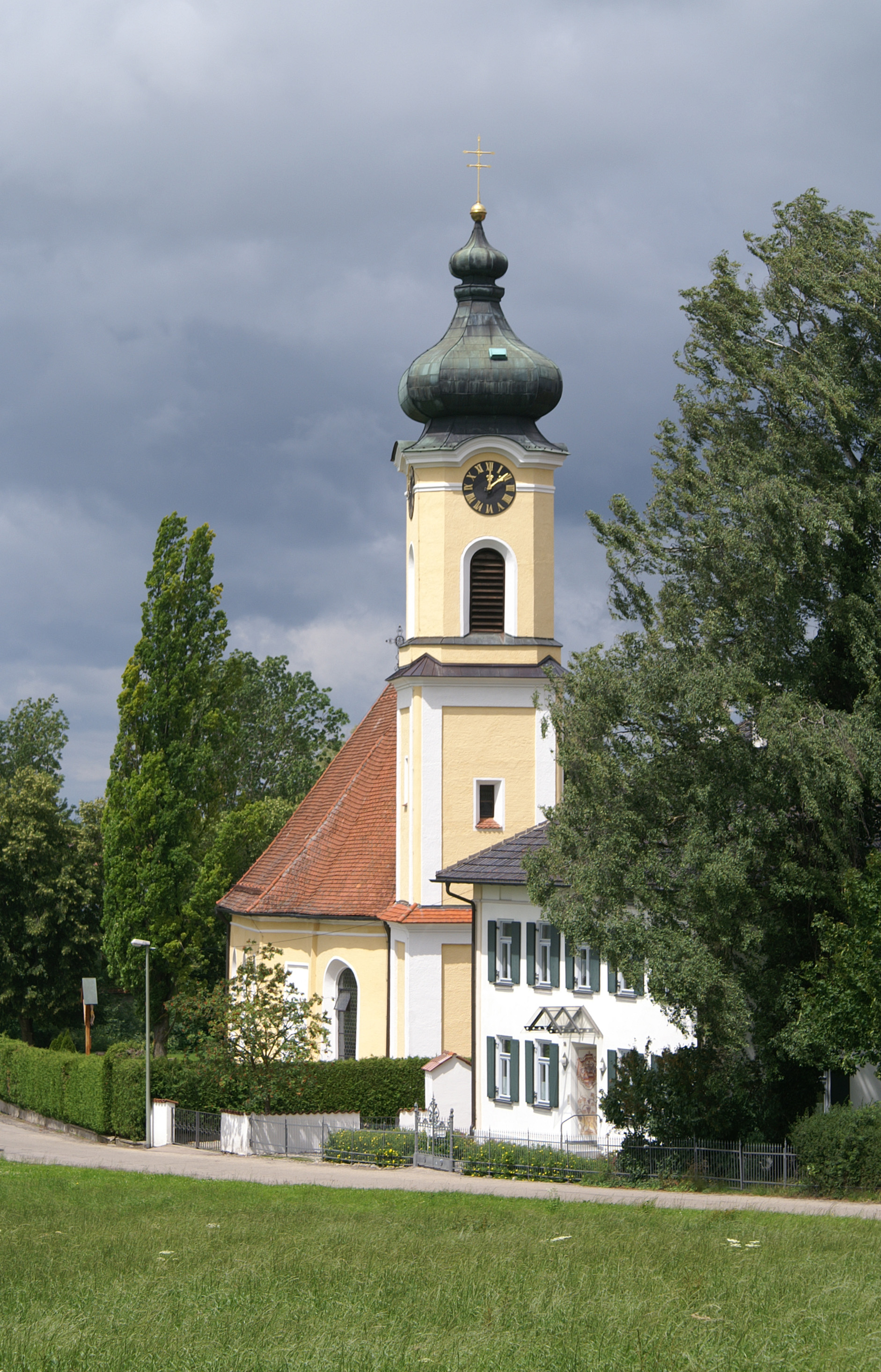 Kirche und Pfarrhaus in Lachen, Unterallgäu